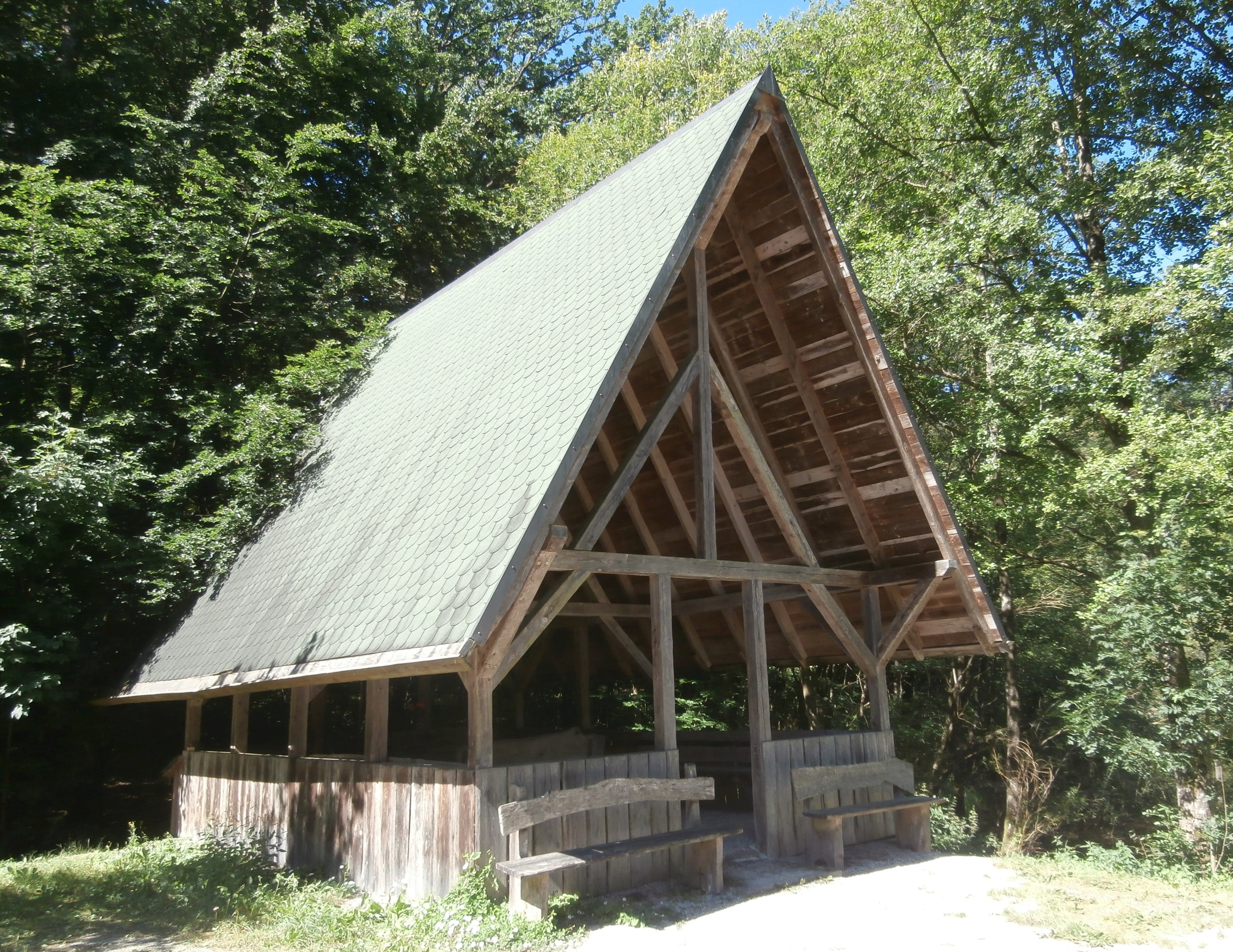 Ruheforst in DE-JTU Jagsthausen: Aussegnungskapelle am Waldsee.